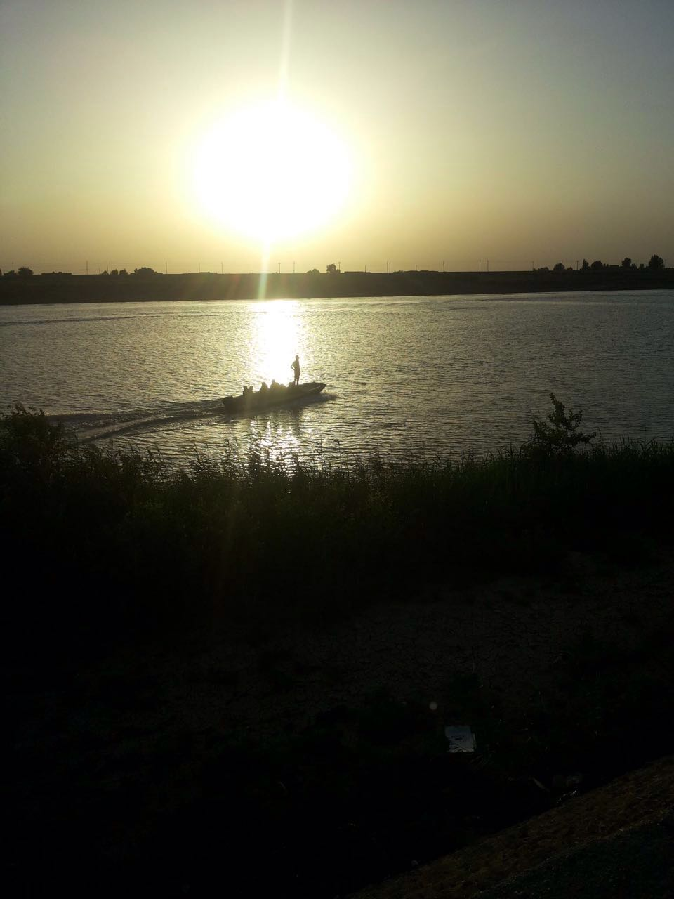 الشجرة التين والأغنام